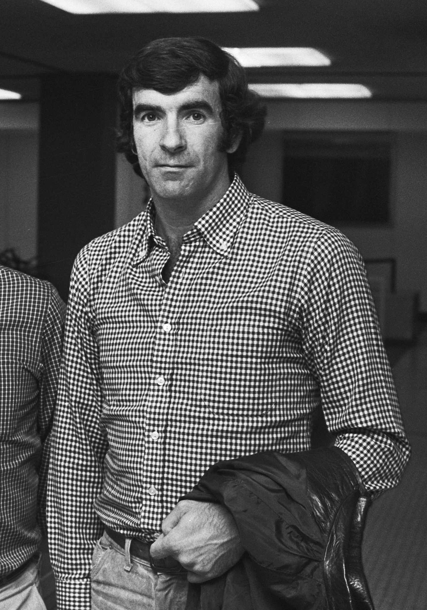 Arrivée de l'Athletic Bilbao à l'aéroport d'Amsterdam-Schiphol. Le gardien de but Iribar. Photographie par Bert Verhoeff / Anefo.